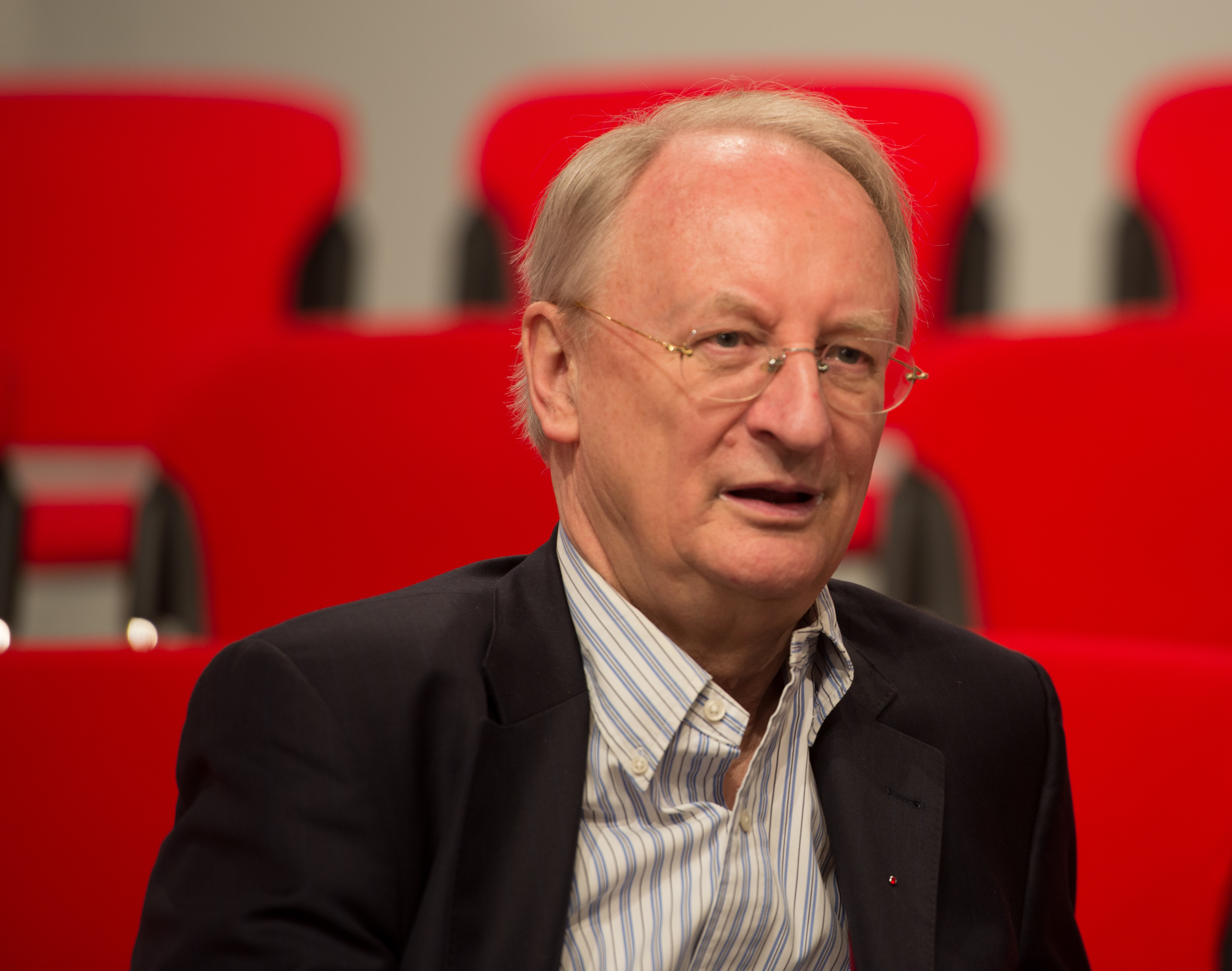 Klaus Staeck auf dem SPD Bundesparteitag am 19. März 2017 in Berlin